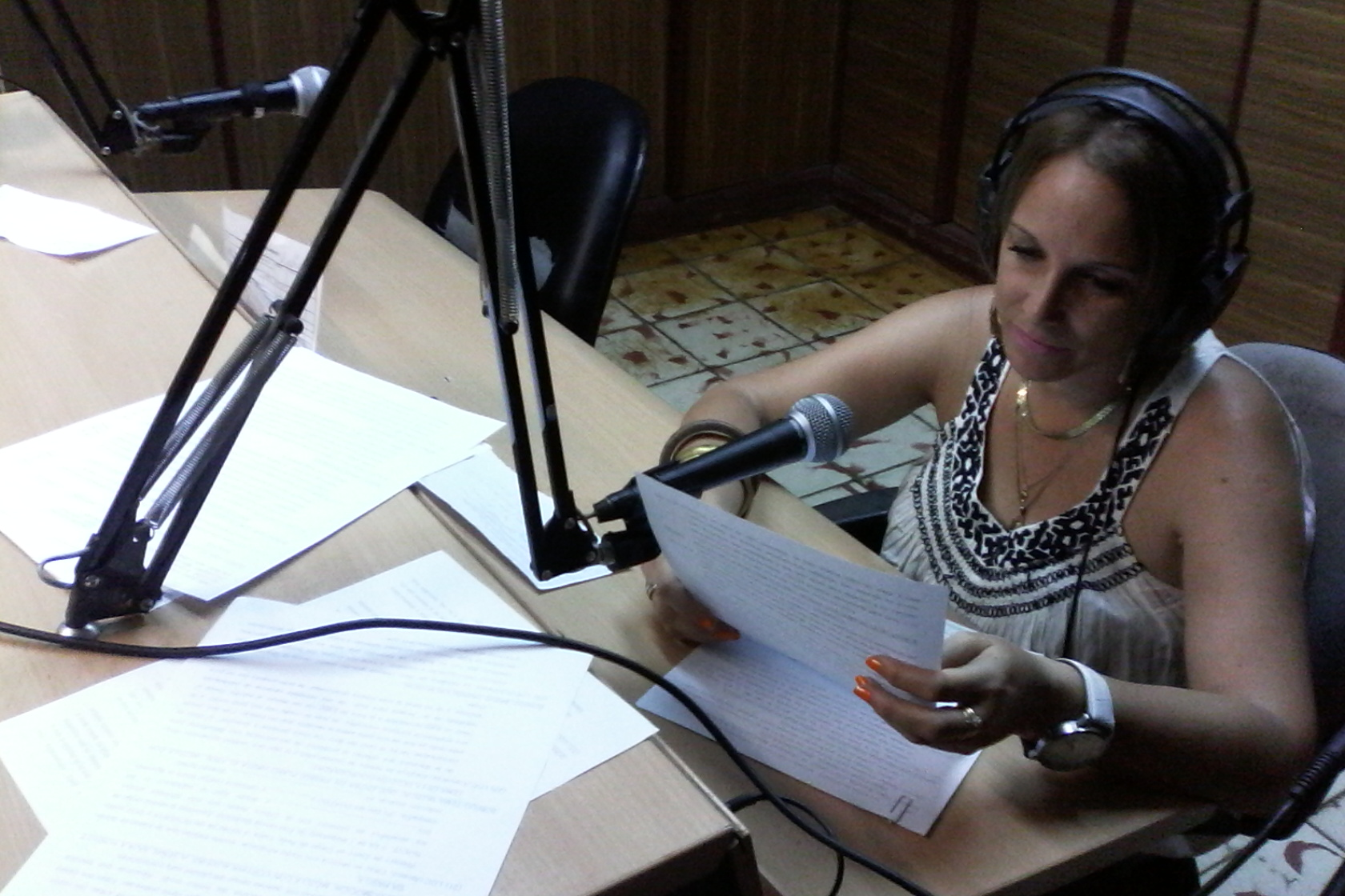 Jurtzenka Sánchez, locutora de Radio Amanecer